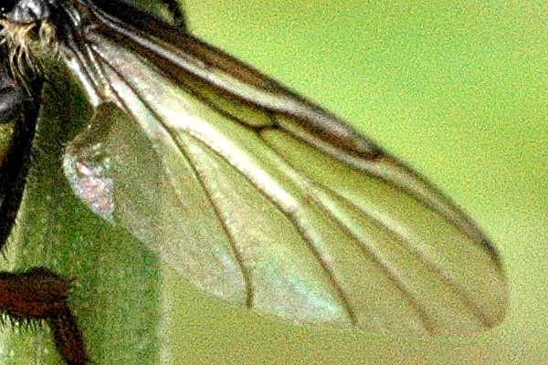 Picture taken in Commanster, Belgian High Ardennes . Species: Bibio lanigerus, wing detail